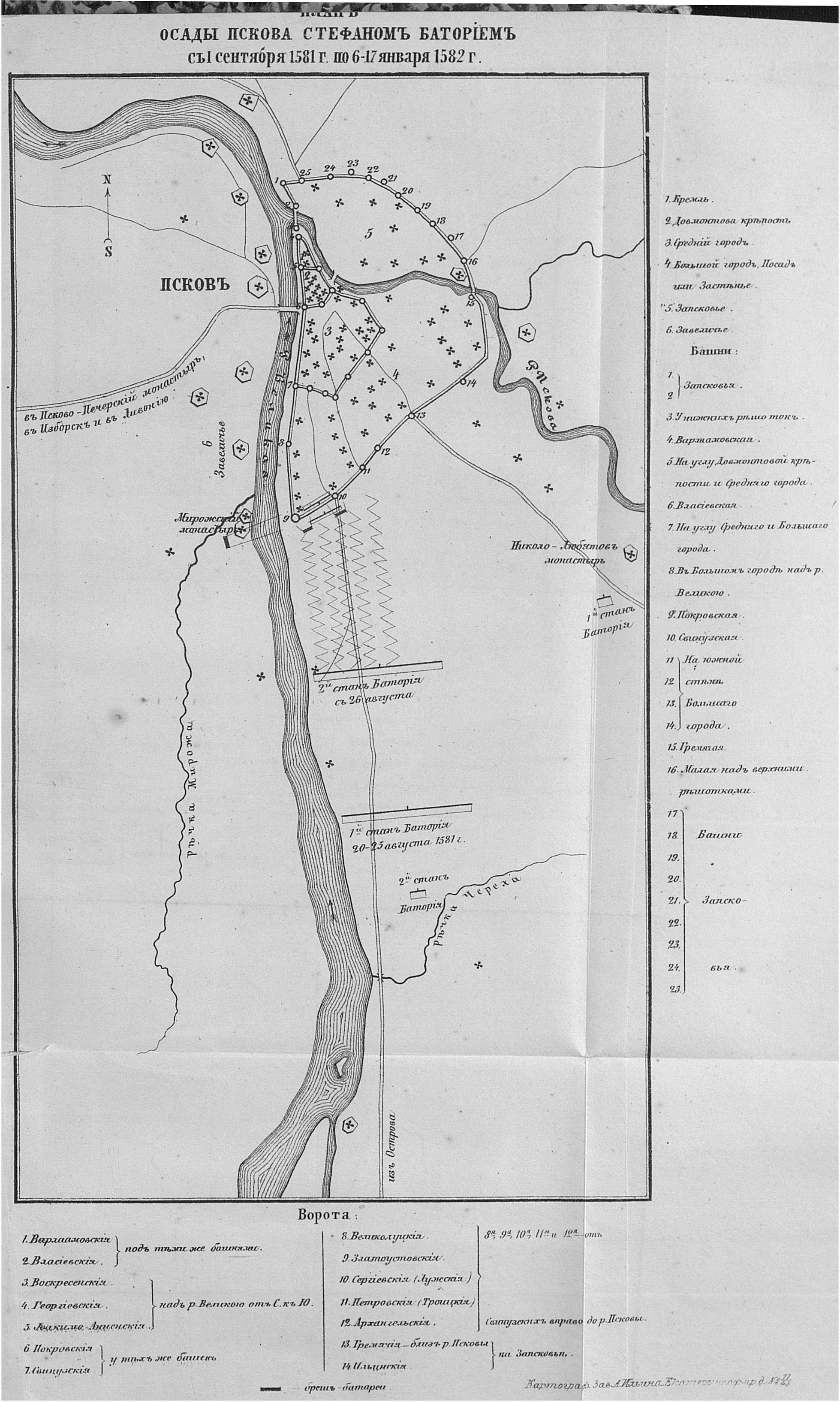 Карта осады Пскова в 1581-1582 гг.